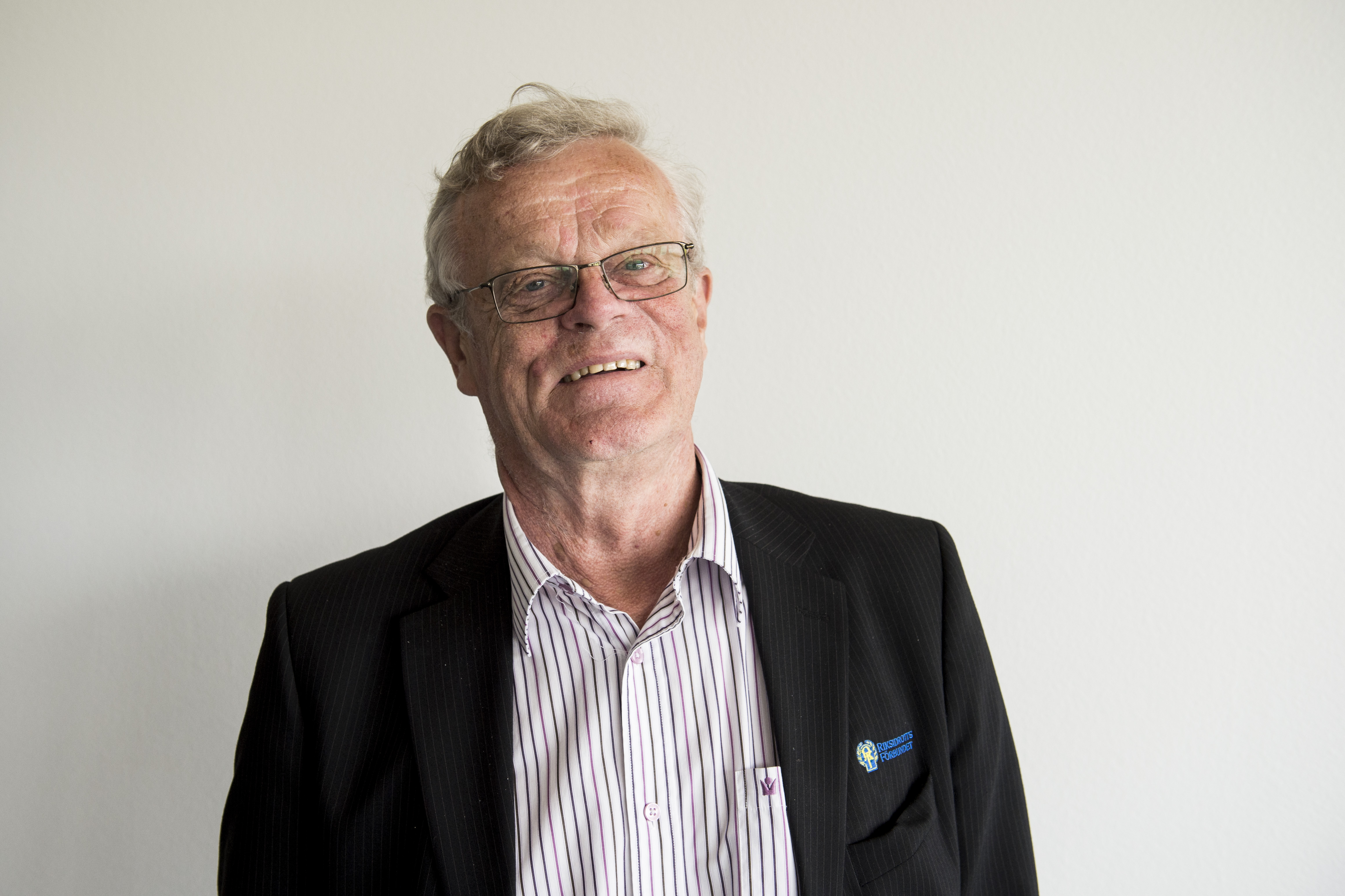 Ordföranden för Riksidrottsförbundet, Björn Eriksson.